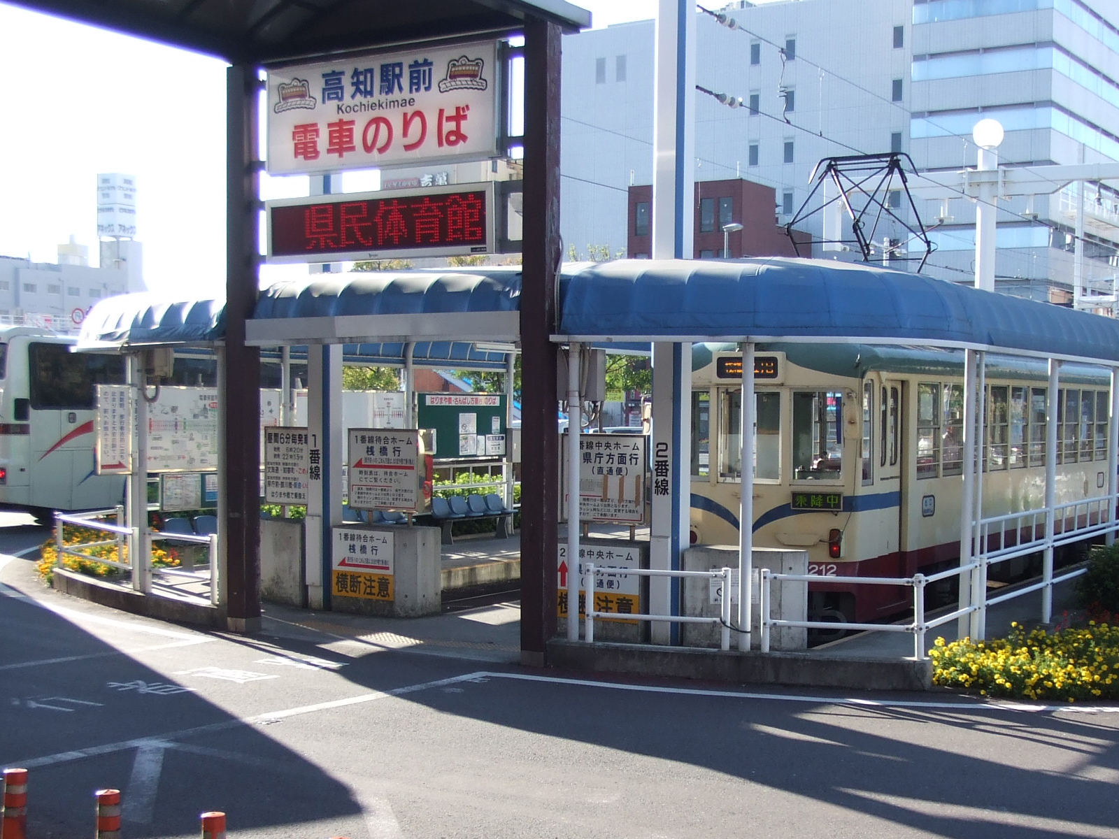 高知駅前 (土佐電気鉄道)